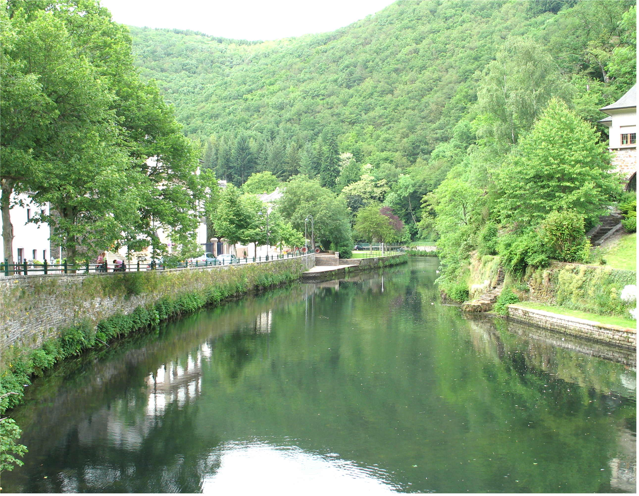 D'Sauer zu Esch-Sauer.